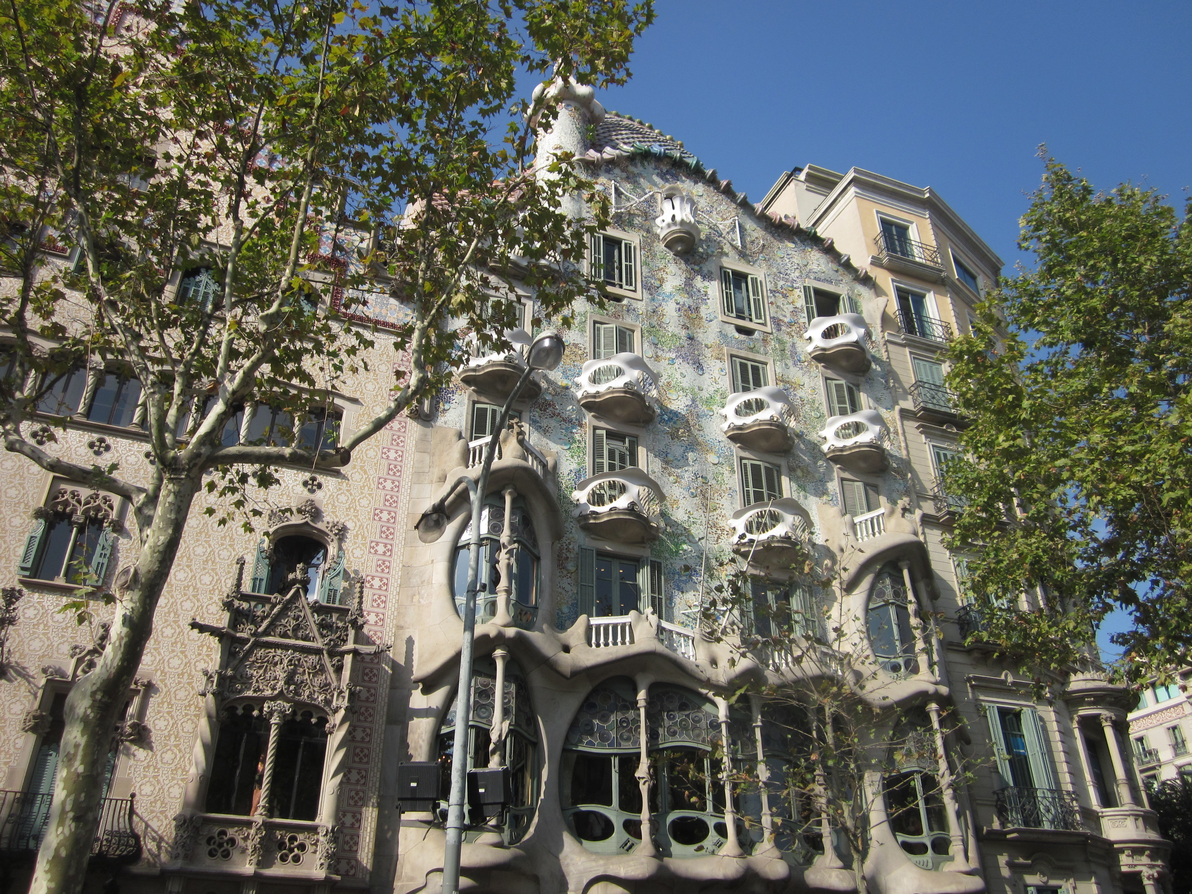 Casa Batllo by Antonio Gaudi